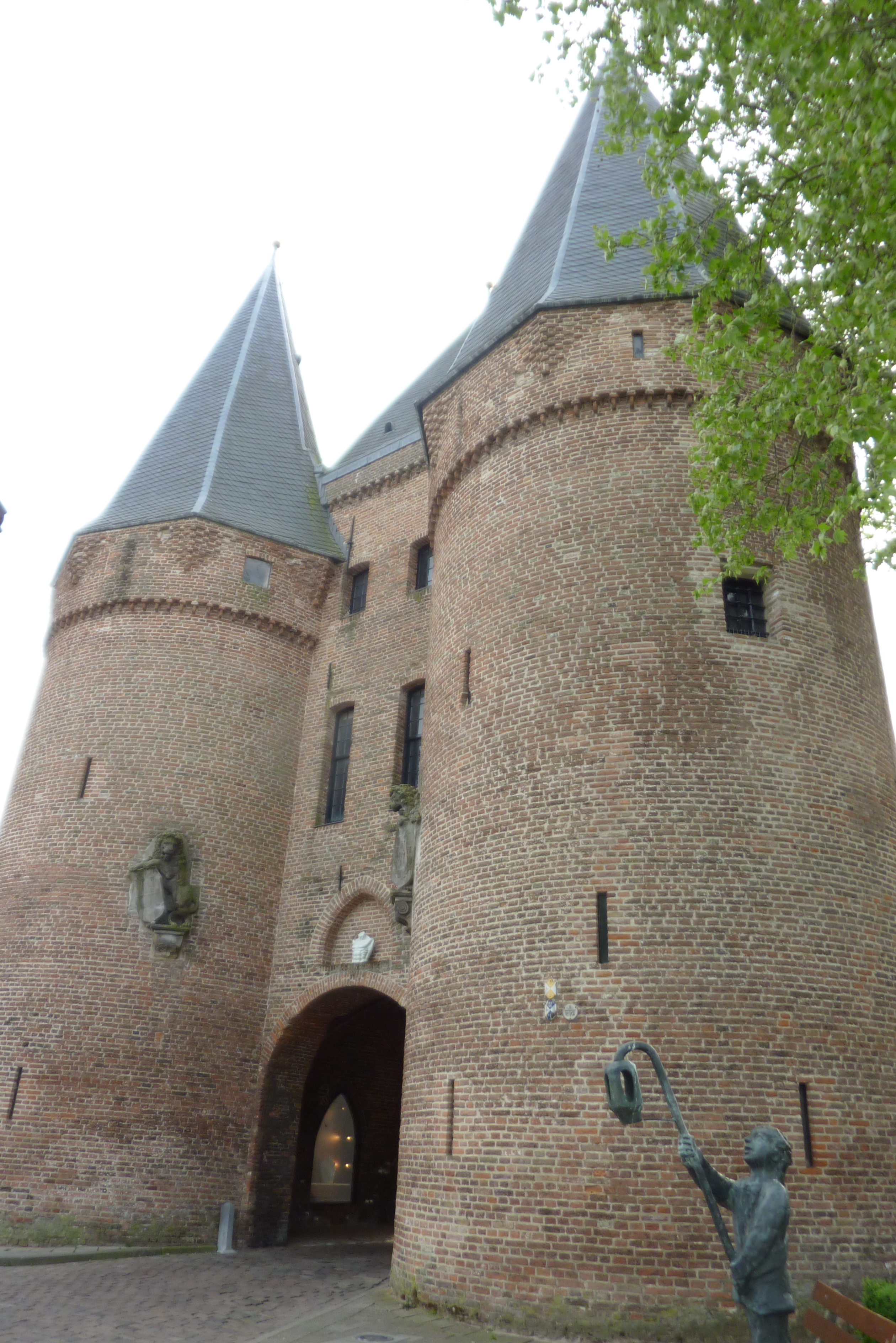 Kampen: Buitenzijde van de Koornmarktspoort met het beeldhouwwerk de Lantaarndrager van Thomas Rodr